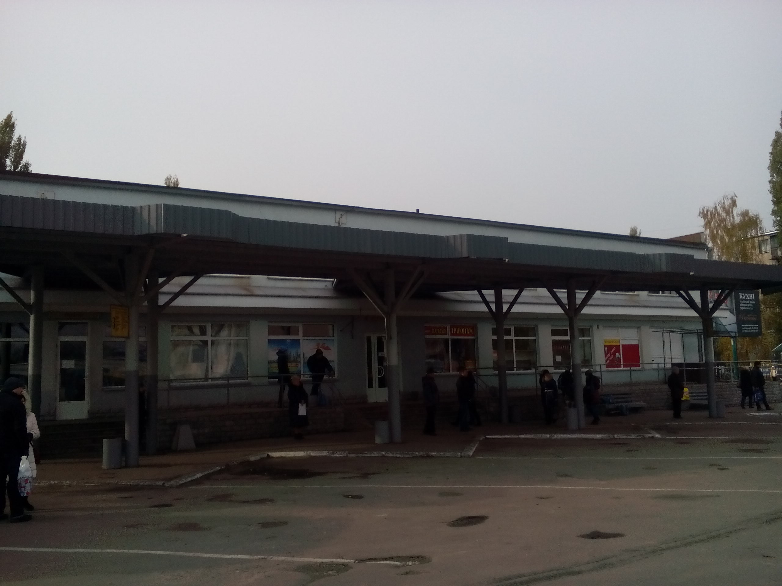 Автостанція у місті Кременчук Полтавської області